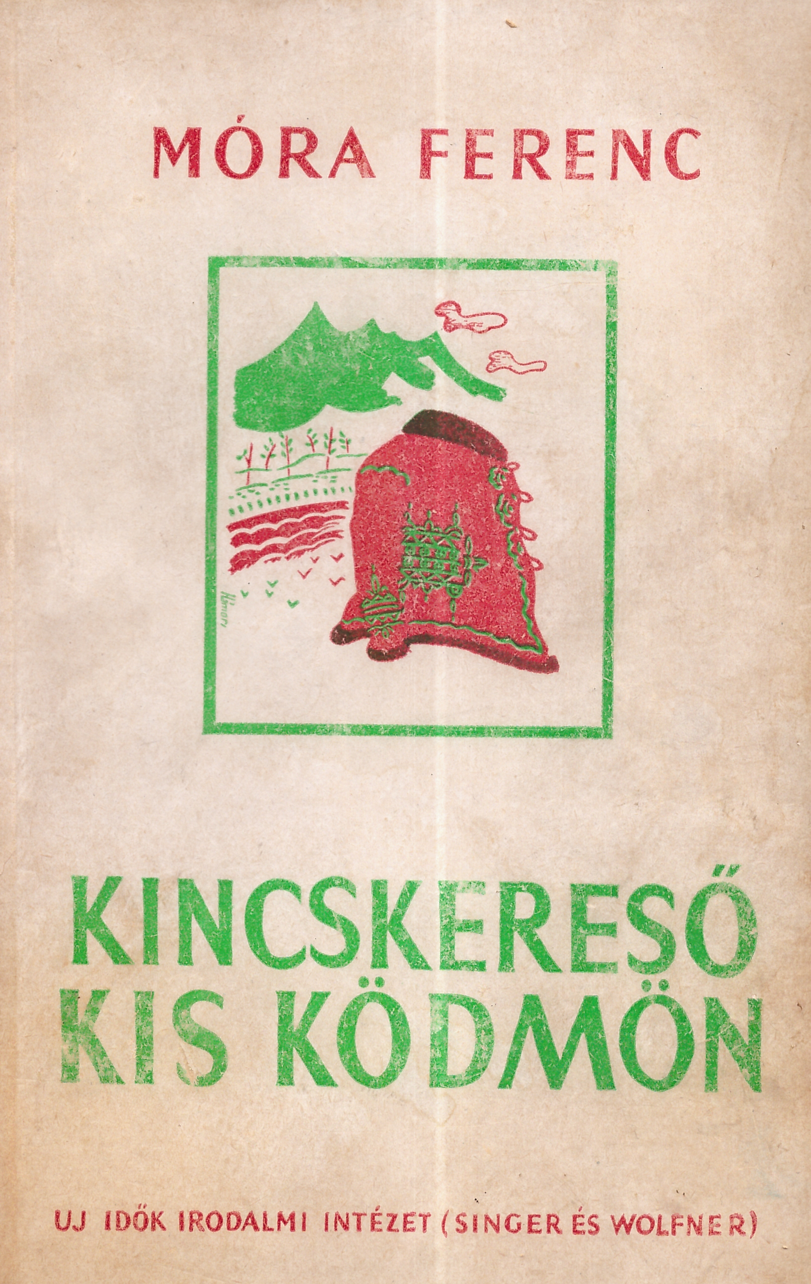 Móra Ferenc (1879-1934): Kincskereső kis ködmön (1930-as évekbeli kiadás)